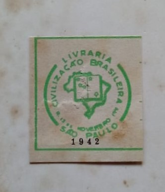 Emblema da editora Civilização Brasileira em 1942 que tem num exemplar da Revista do IPHAN de 1938.